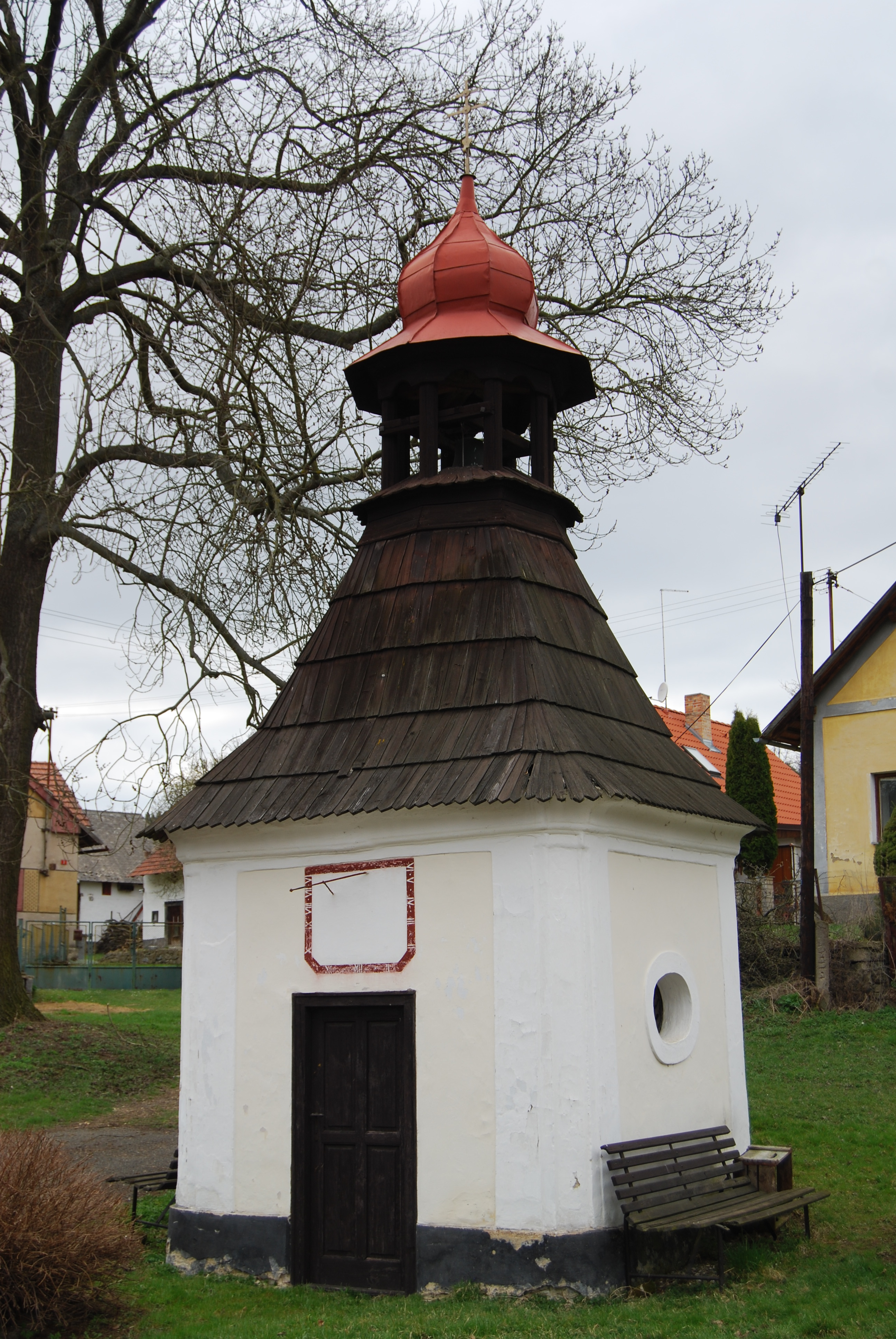 Návesní kaple. Vrbice je malá vesnice, část obce Krásná Hora nad Vltavou v okrese Příbram. Česká republika.